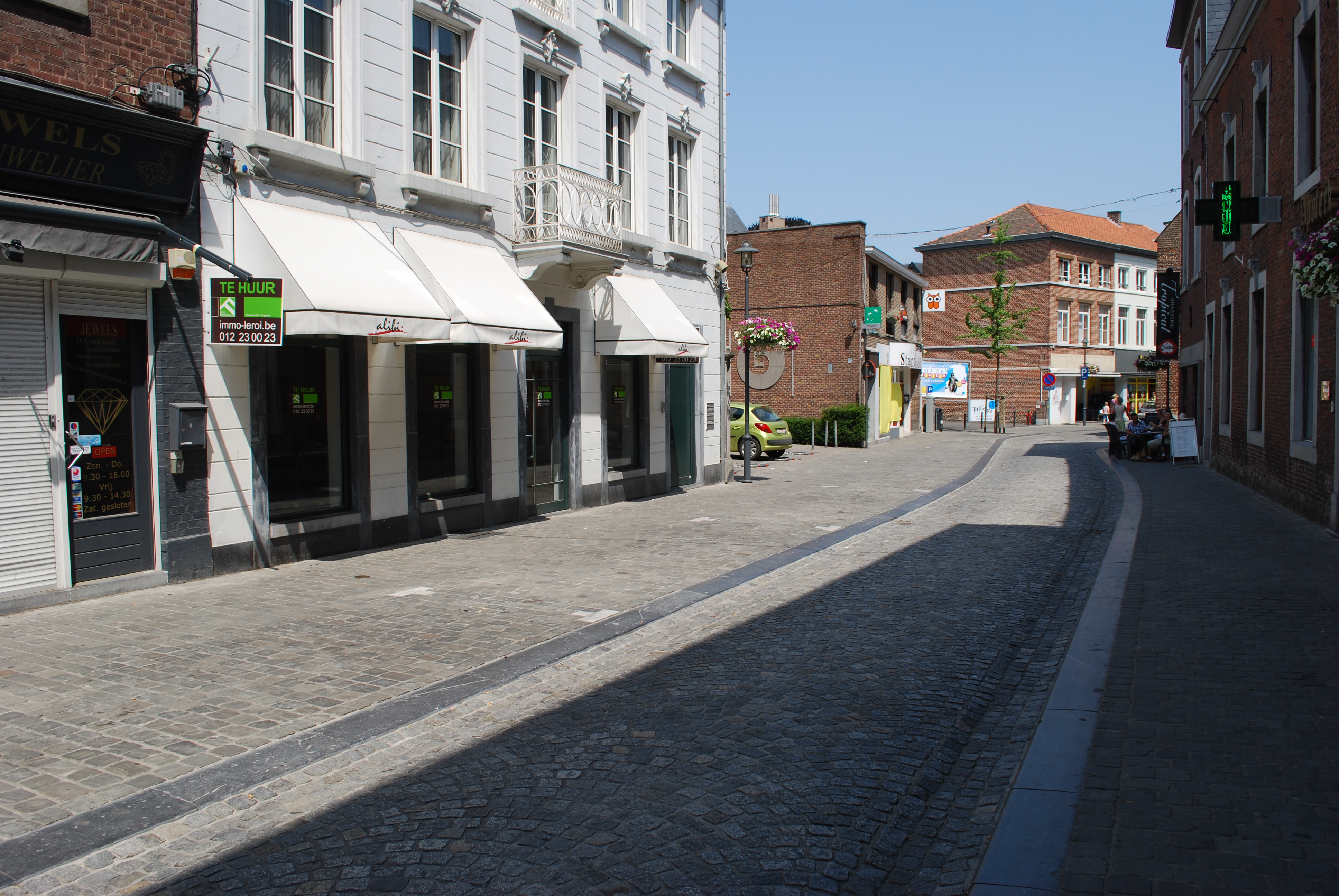 Maastrichterstraat à Tongres.